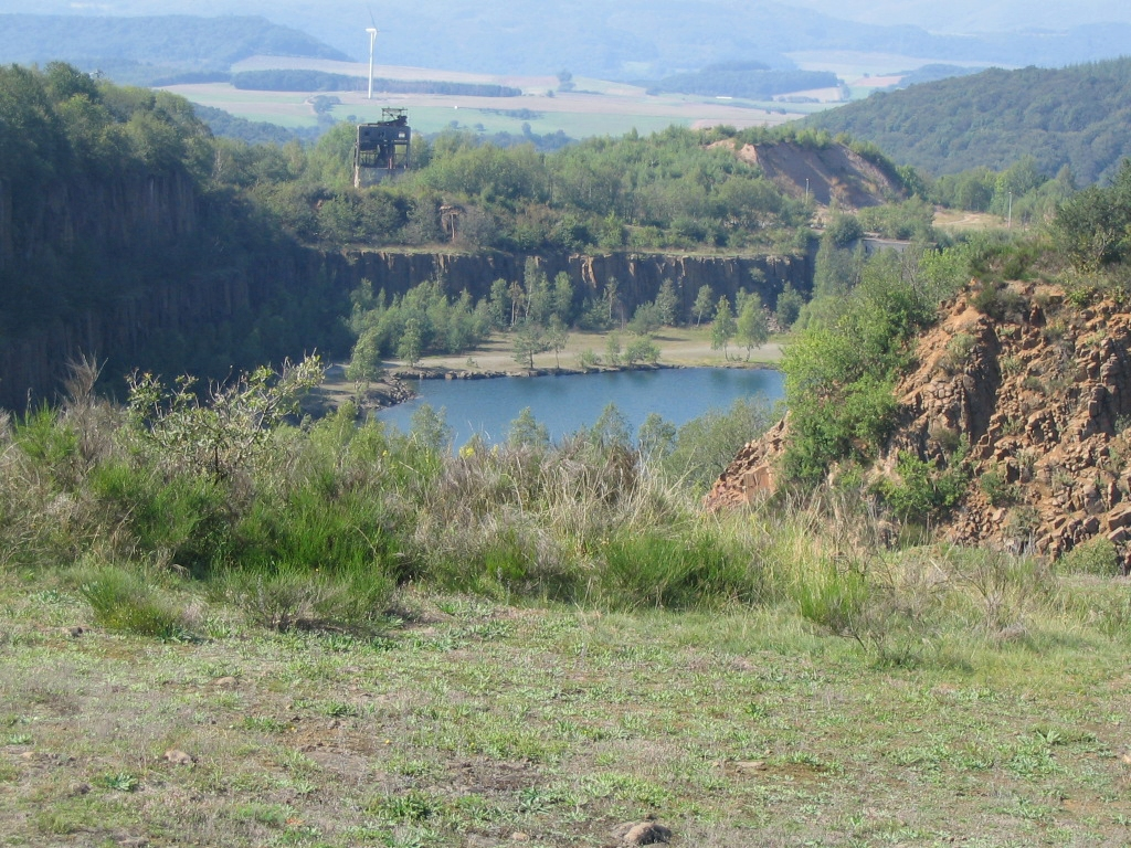 Der Steinbruch auf dem Schneeweiderhof (Aufnahmedatum 05. September 2004)